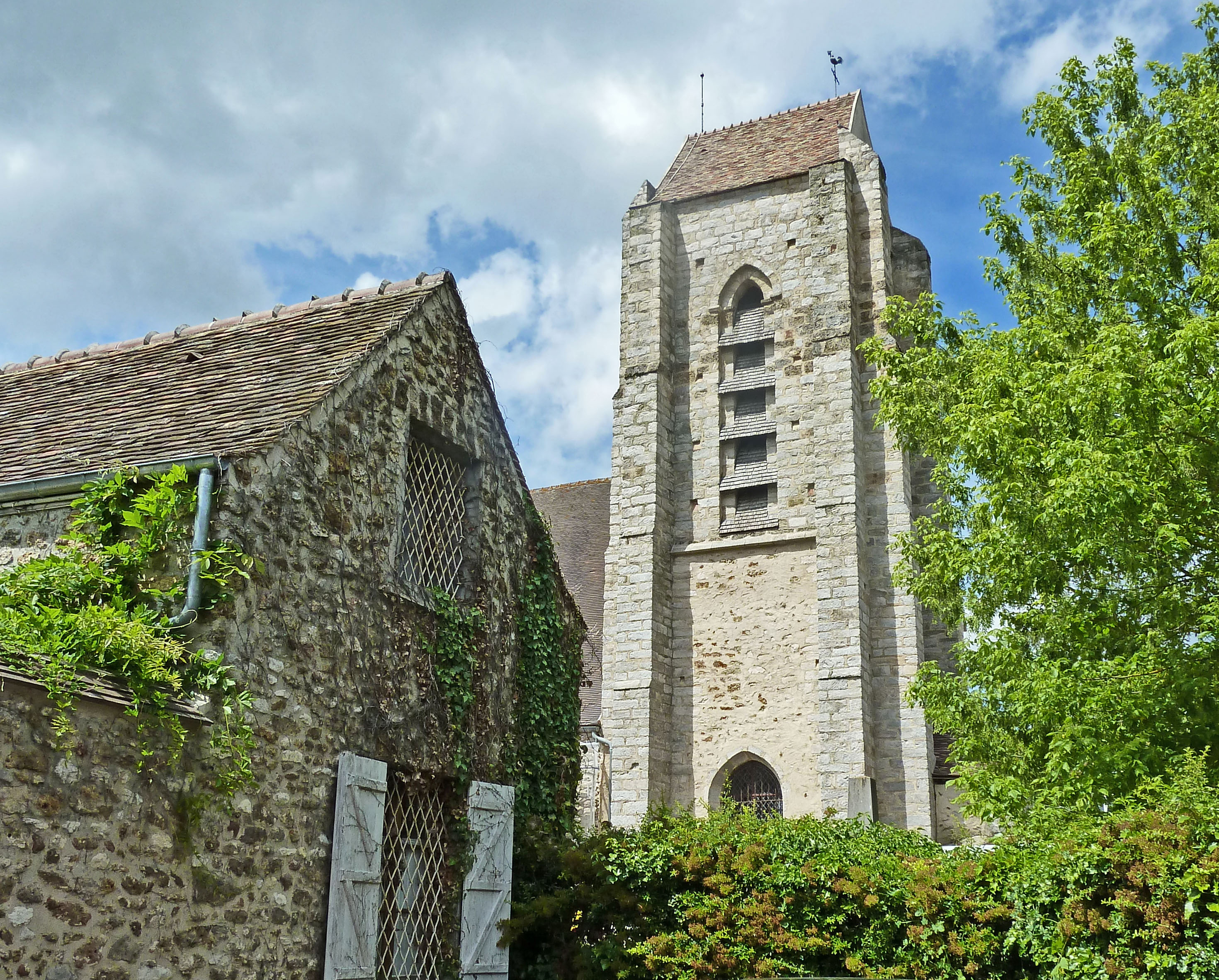 11è au 18è siècle .